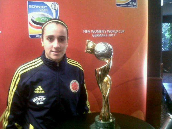 Paula Forero Presentación de Mundial Femenino en Alemania. Hotel La Fontana - Bogotá.